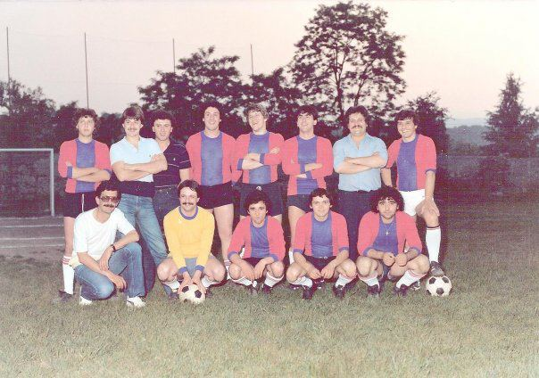 Giocatori dell'Associazione Calcio Gozzano attorno al 1980